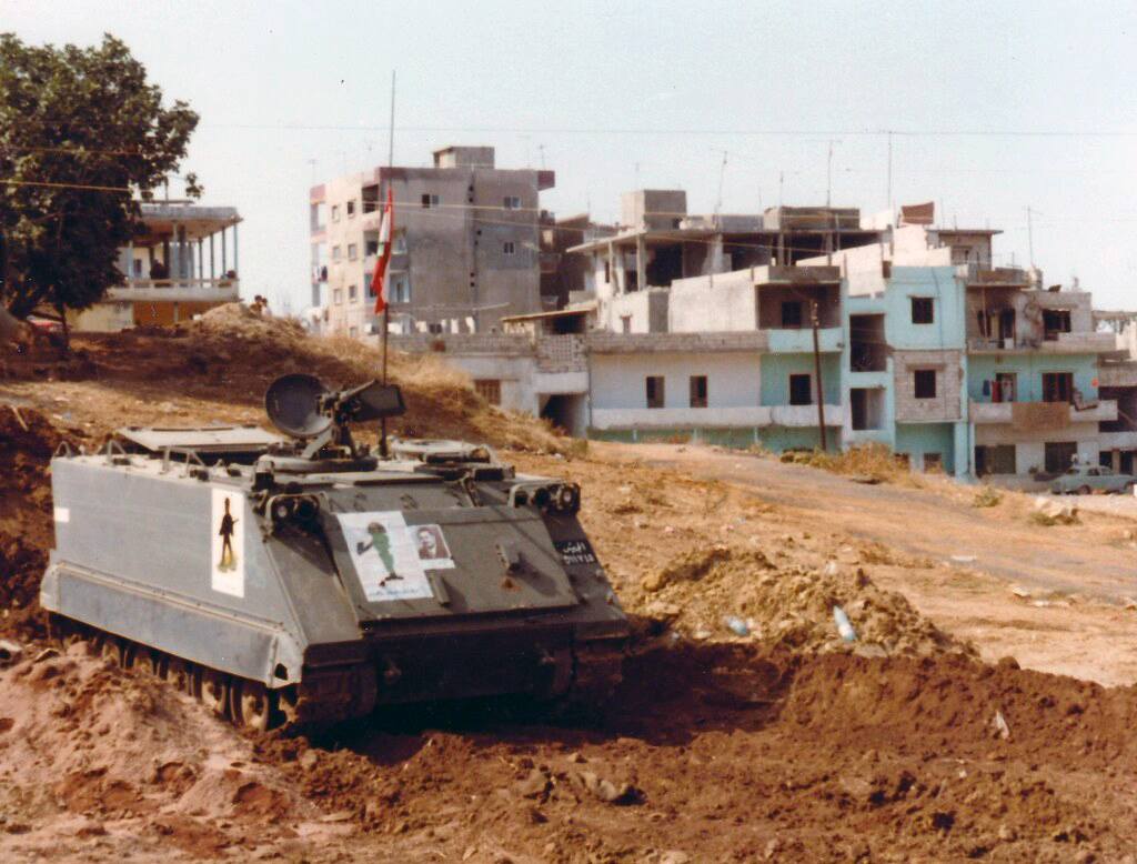 Lebanese Army APC, Beirut 1982